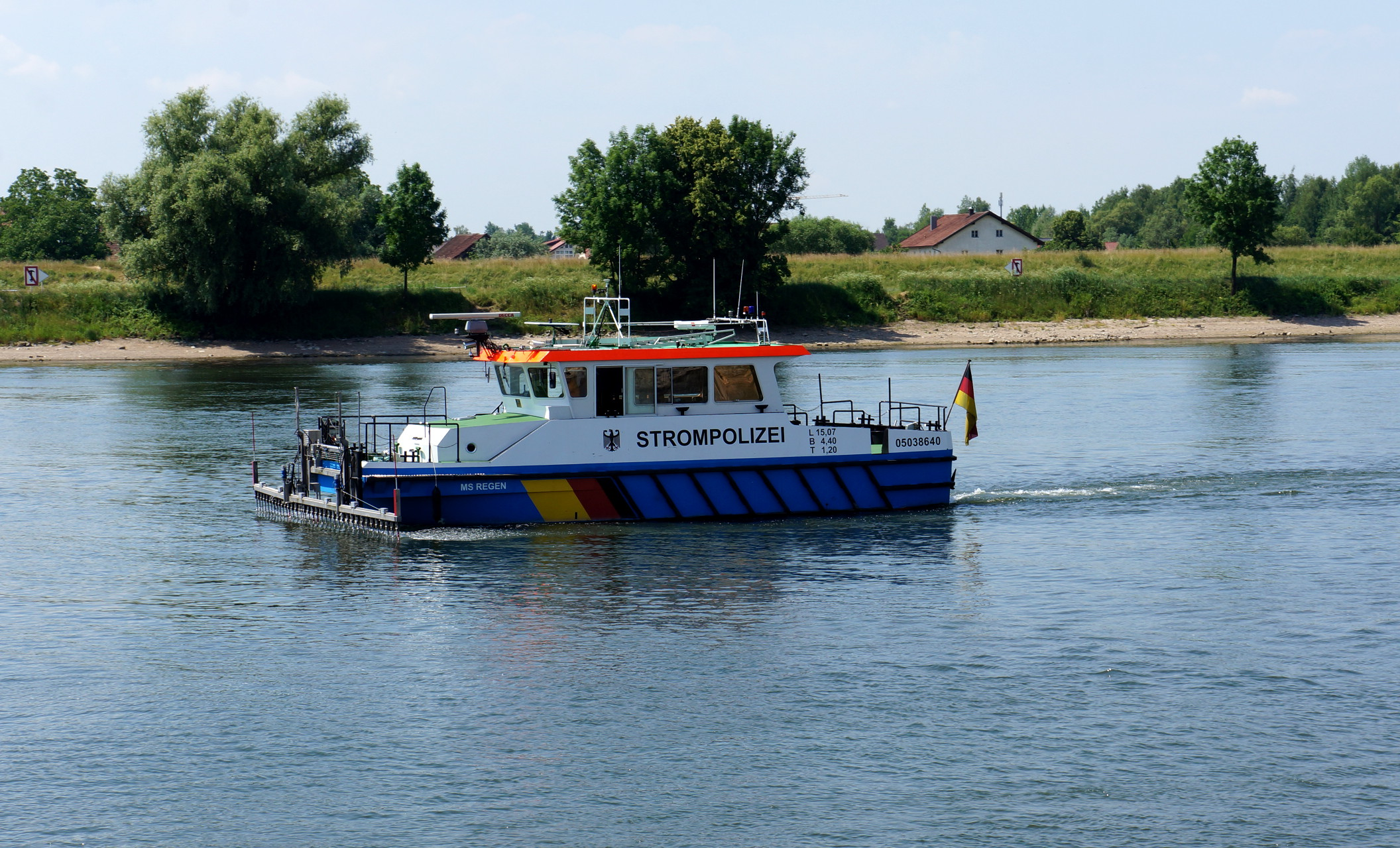 Boot der Strompolizei auf Donau